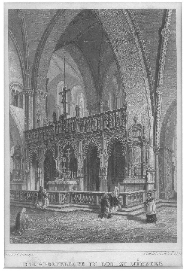 Der Apostelgang im Dom zu Münster; Stahlstich, Mitte 19. Jh. von Joh. Poppe, nach einer Zeichnung von J. F. Lange. veröffentlicht in: Tobias Schrörs, Der Lettner im Dom zu Münster. Forschungen zur Volkskunde, Heft 50, 1. Auflage 2005. Der Stahlstich befindet sich im Eigentum von Tobias Schrörs. Veröffentlichung bei Wikipedia mit freundlicher Genehmigung des Eigentümers, zugleich Autor des o.g. Werkes